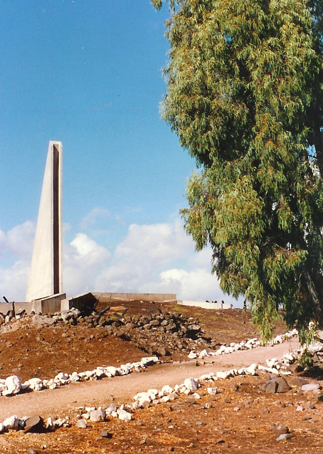 Op de Golan Héichten.